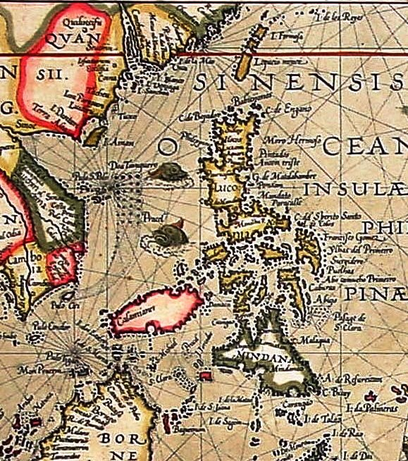 title= size=38x53cm; 1e druk 1592, deze druk 1617.